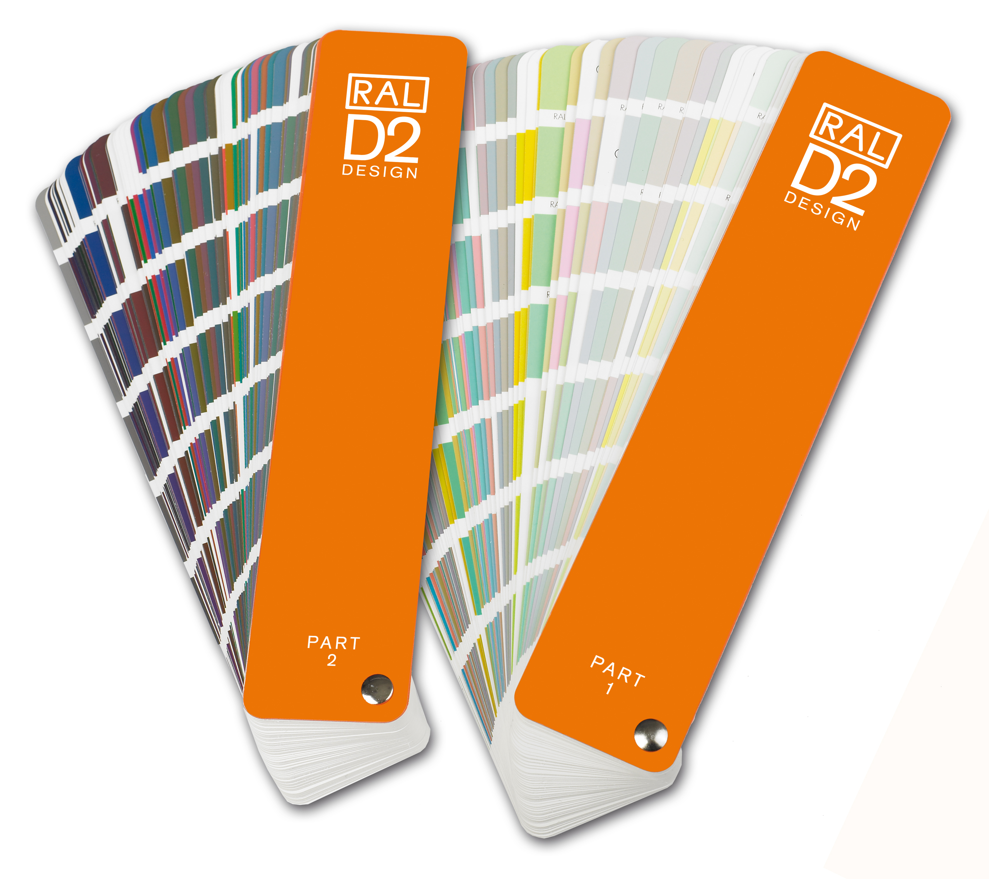 Das RAL DESIGN System enthält 1.625 Farben.